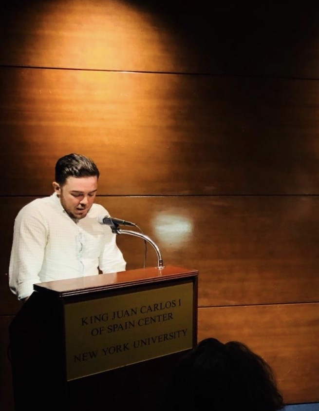 El escritor Carlos Contreras Elvira, durante una conferencia en el KJCC de New York University.